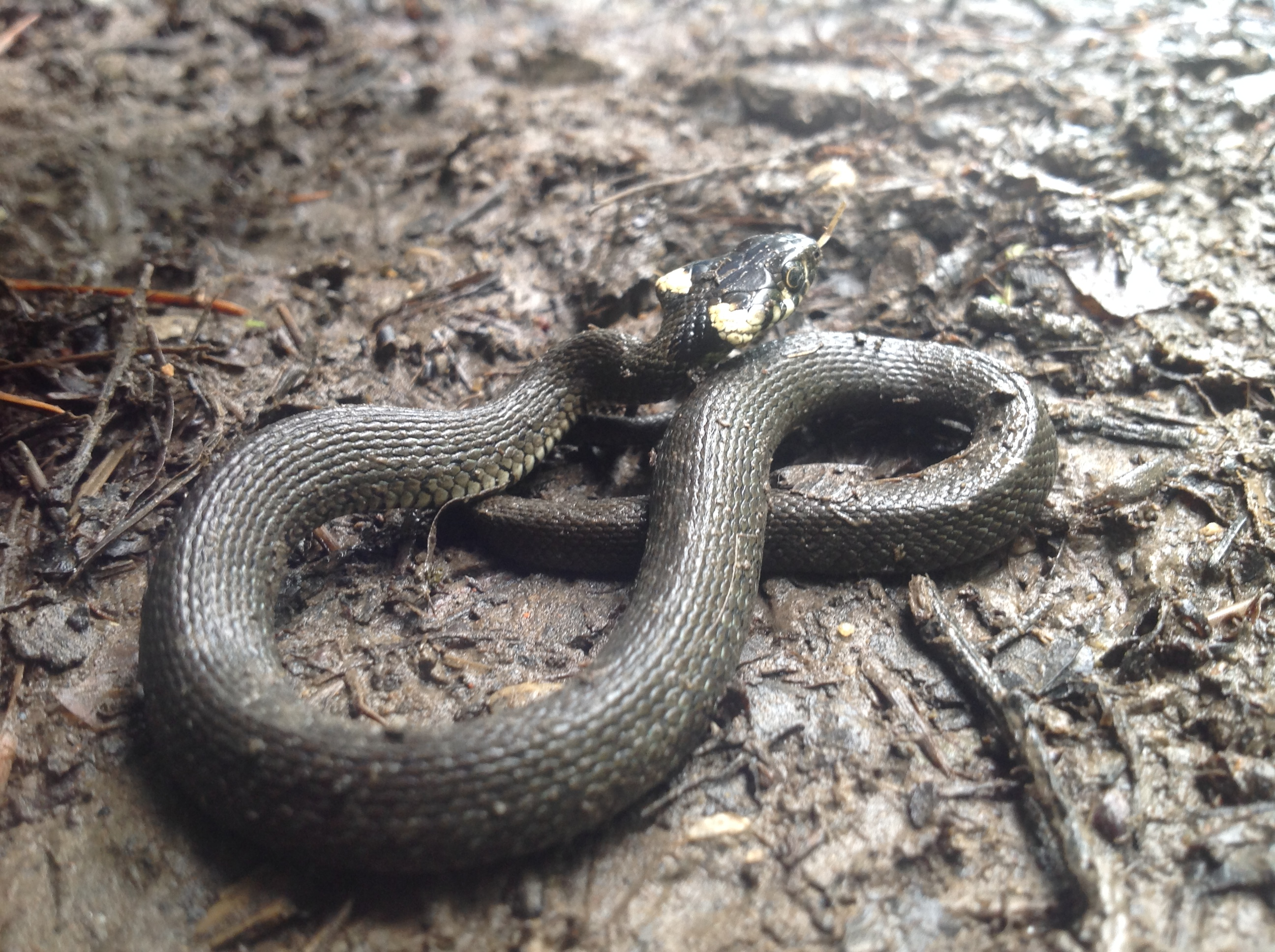 Užovka